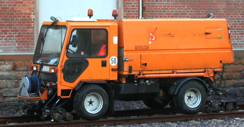 Kleinst-Lkw des Herstellers Ladog als Zweiwegefahrzeug